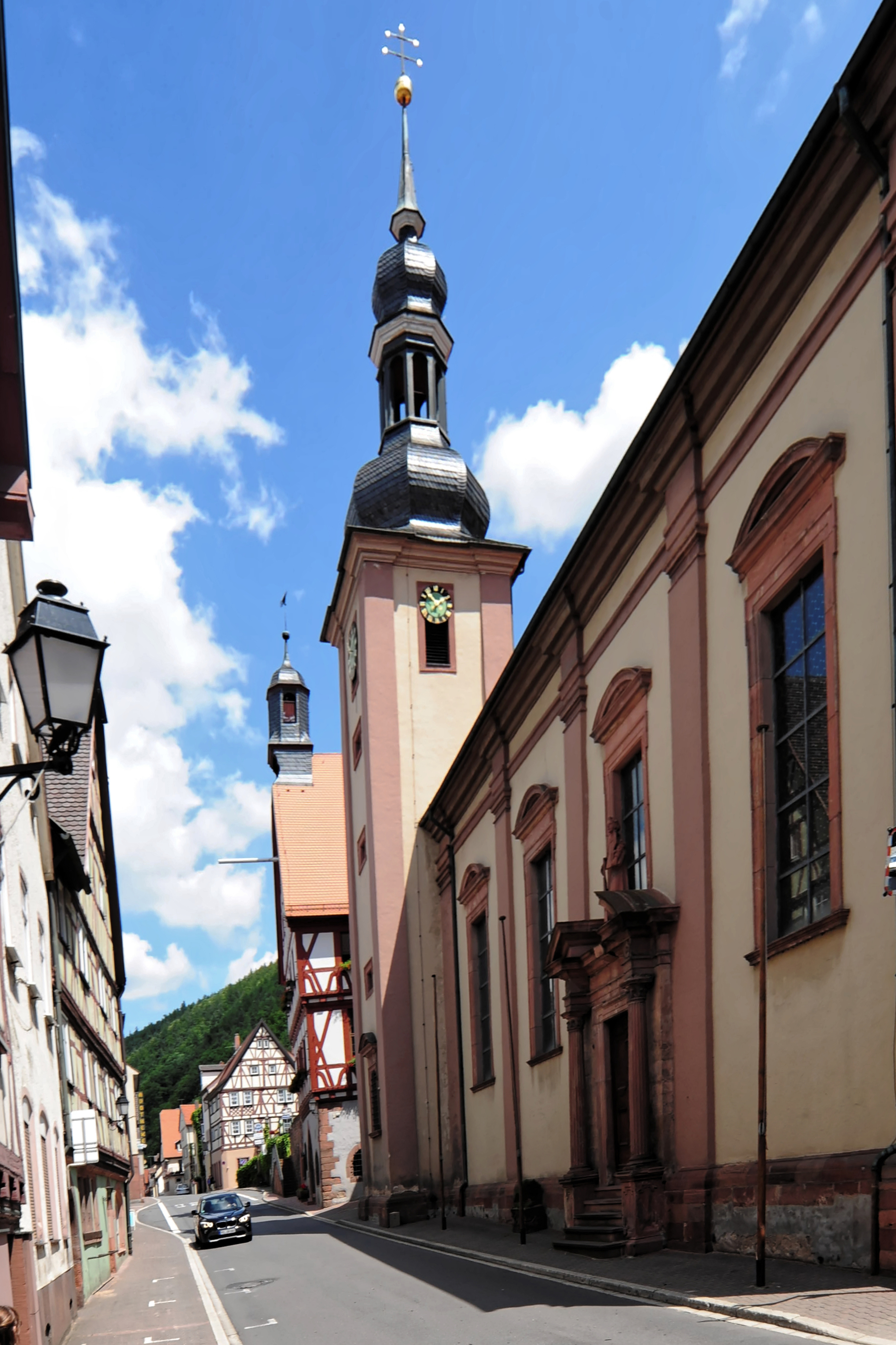 Freudenberg, eine kleine Stadt am Main.